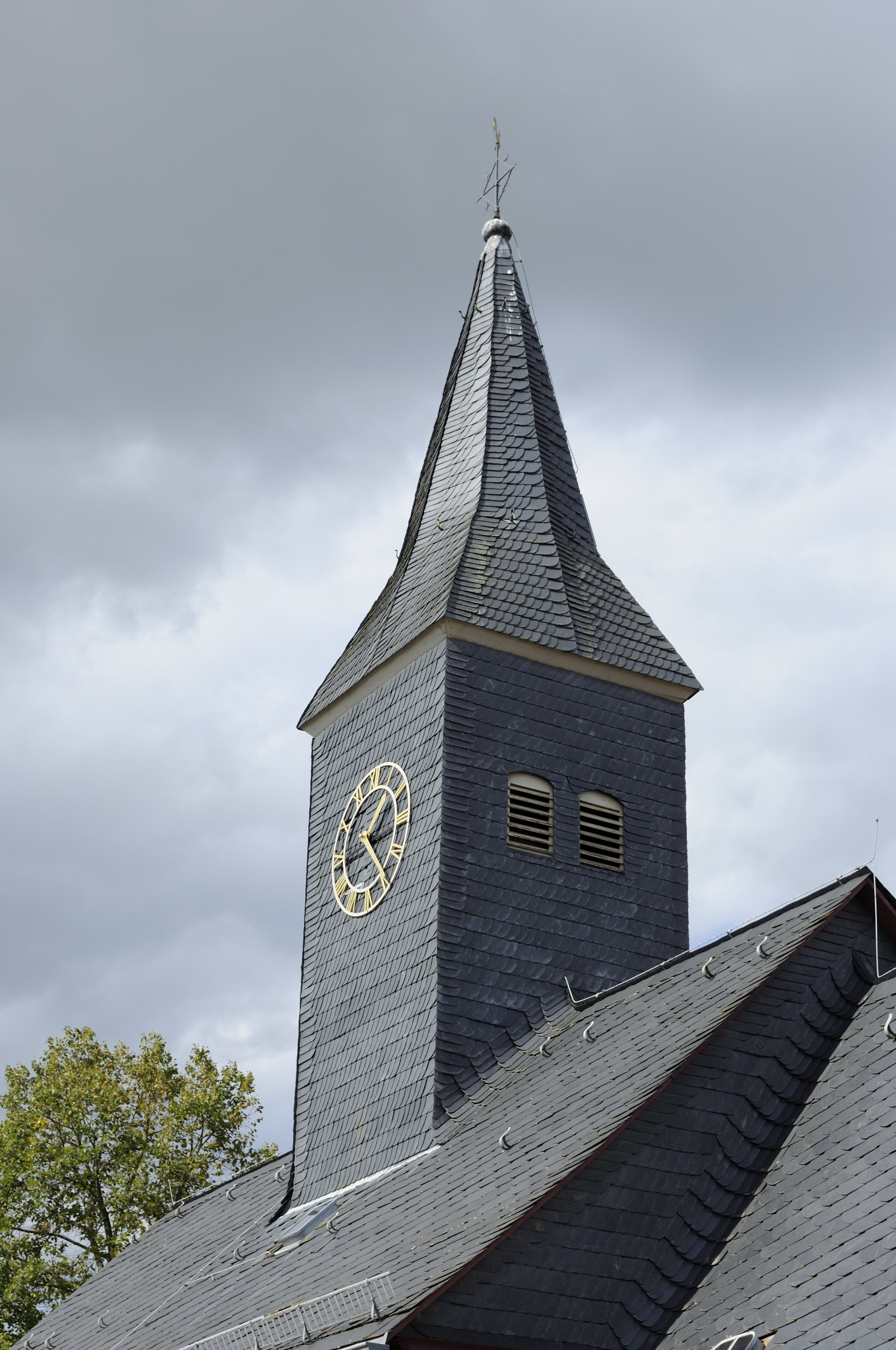 Dieses Foto entstand im Rahmen des Projekts Wiki Loves Monuments Mittelhessen, das aus dem Community-Projektbudget von Wikimedia Deutschland e. V. gefördert wurde.